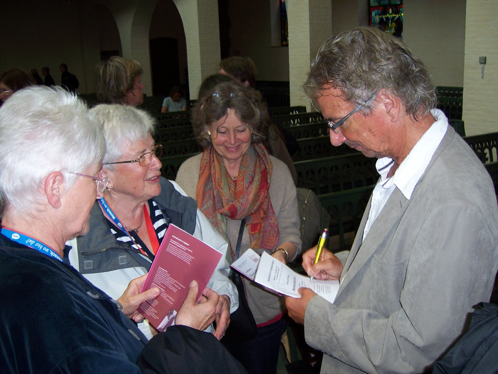 Komponist Harald Weiss (*1949) nach der Aufführung des „Bremer Requiem“ in der Kirche St. Ansgarii (Bremen) zum 32. Deutschen Evangelischen Kirchentag 2009